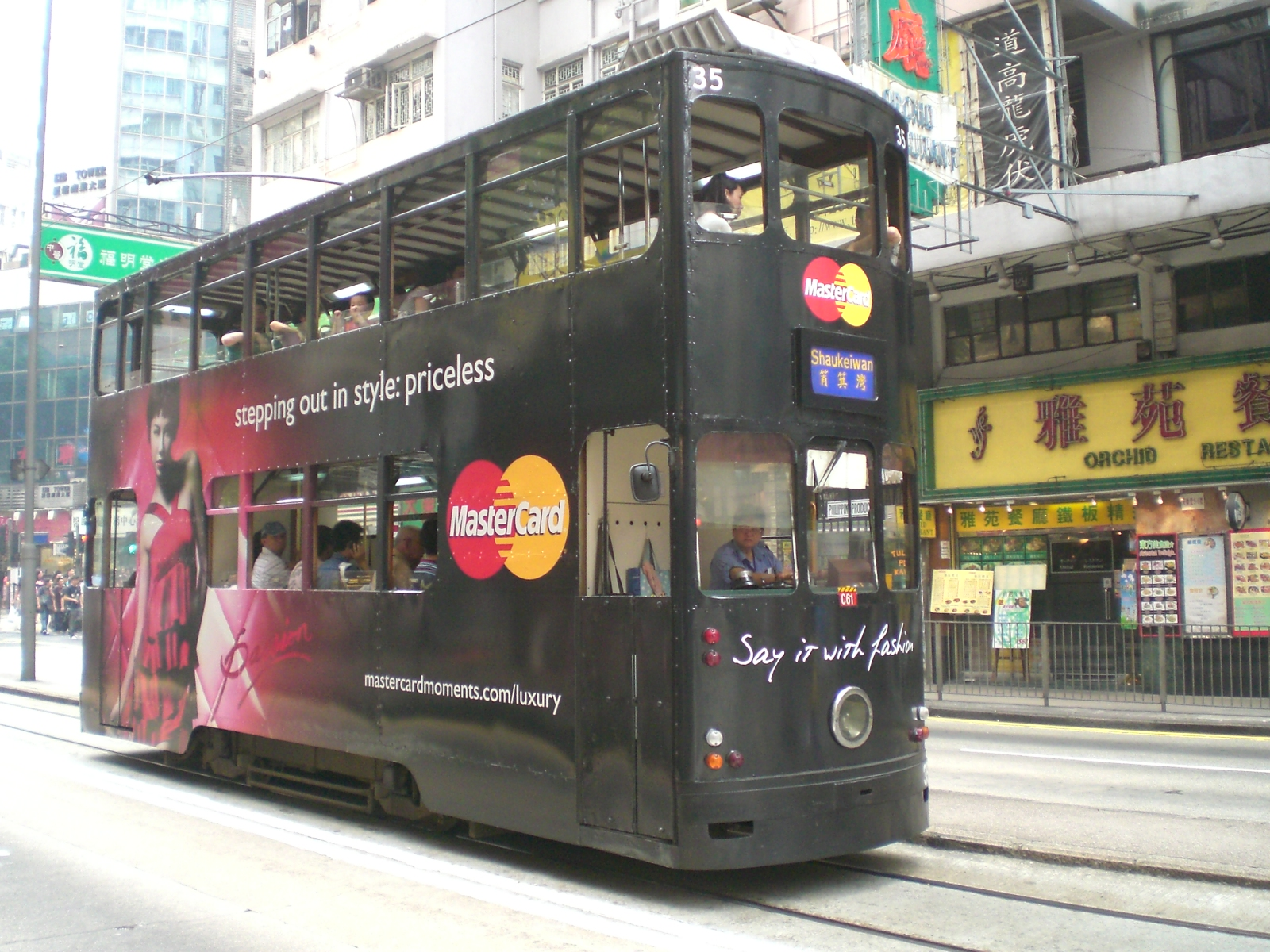 萬事達卡信用卡廣告在香港電車身上